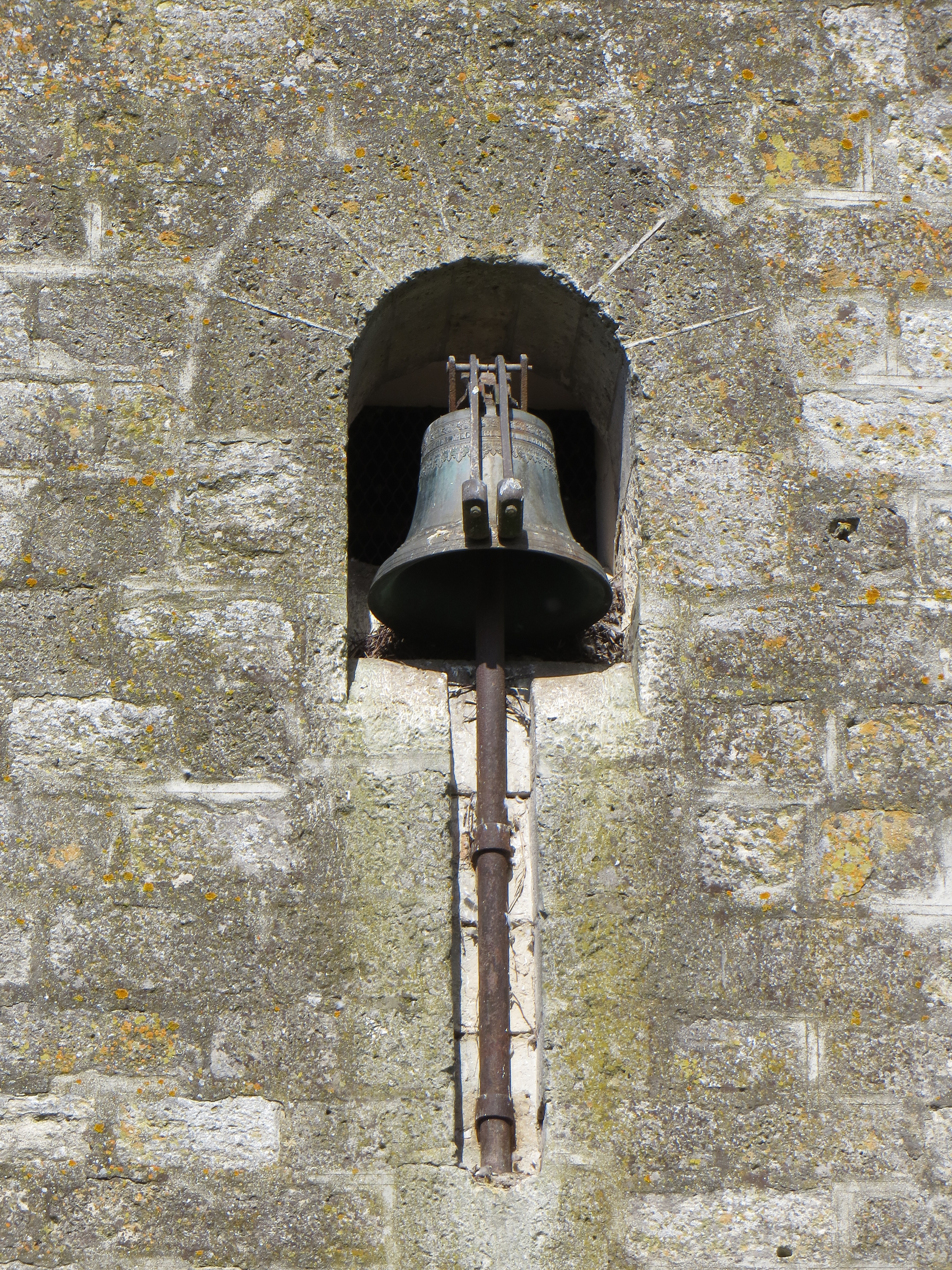 Cloche sonnant les heures, sur le mur de l'église